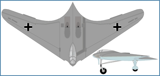 Horten 9V2